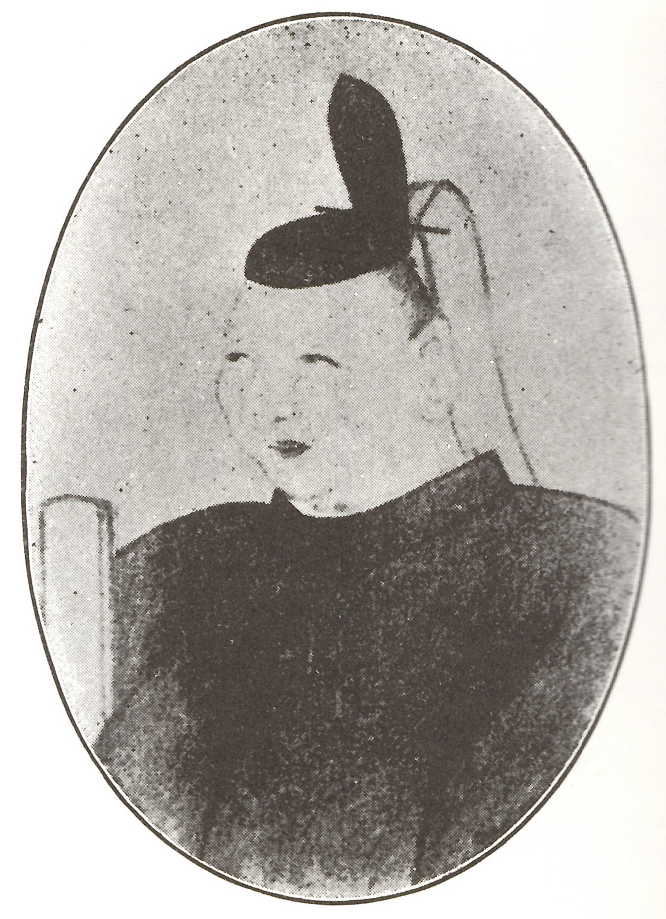 松平直明の肖像。